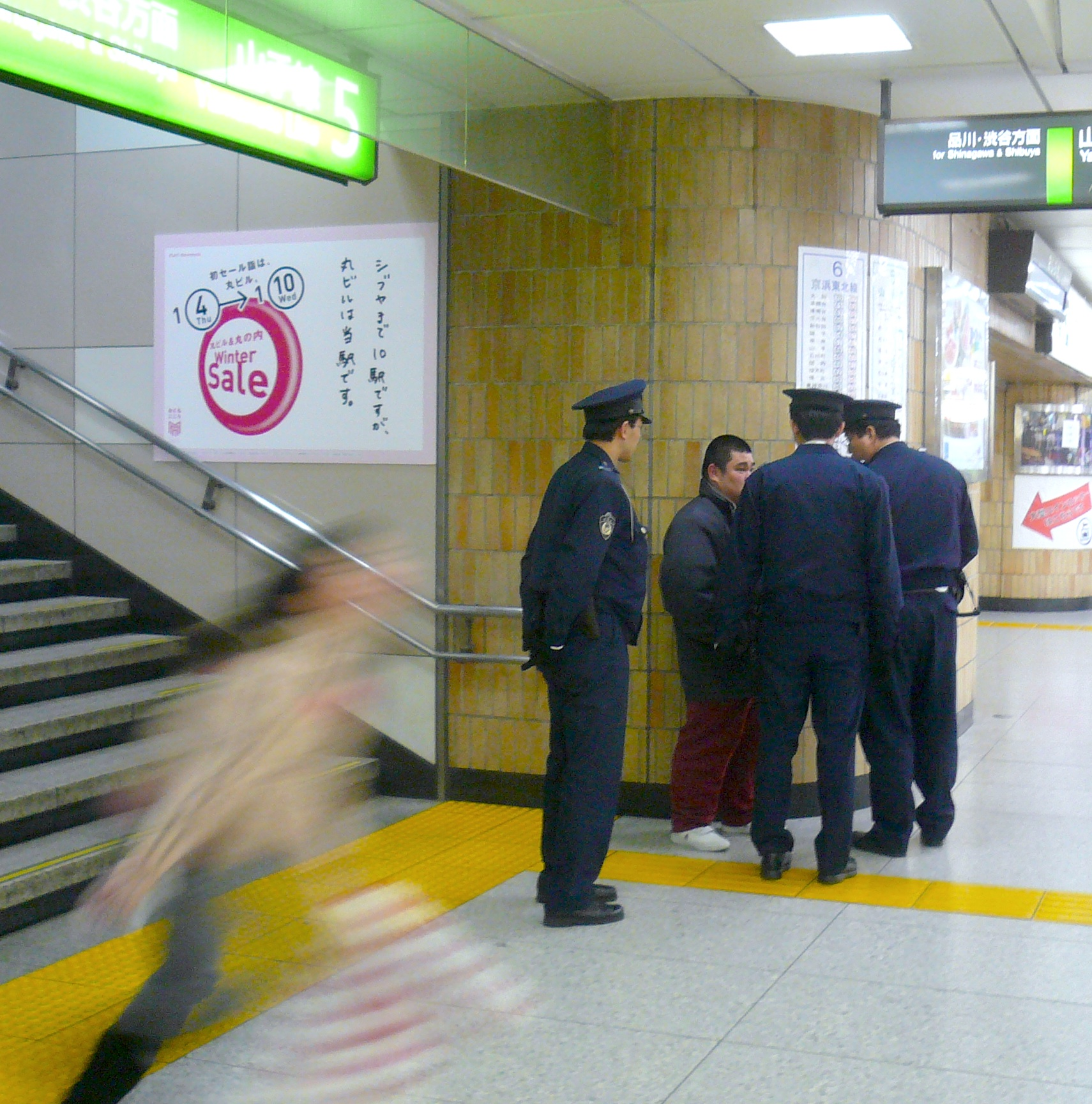 Japanese police question a man inside a train station